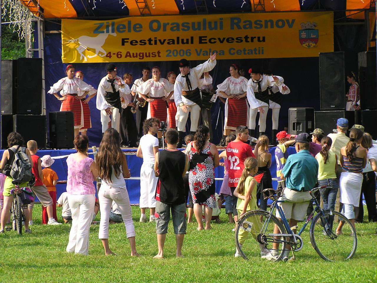 Tanzgruppe beim „Reiterfestival“ der Stadt Râşnov.